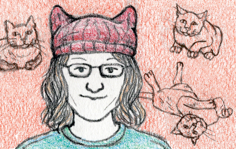 דיוקן עצמי של אמנית הקומיקס אילנה זפרן, וברקע חתוליה, המככבים לעתים קרובות בקריקטורות שלה